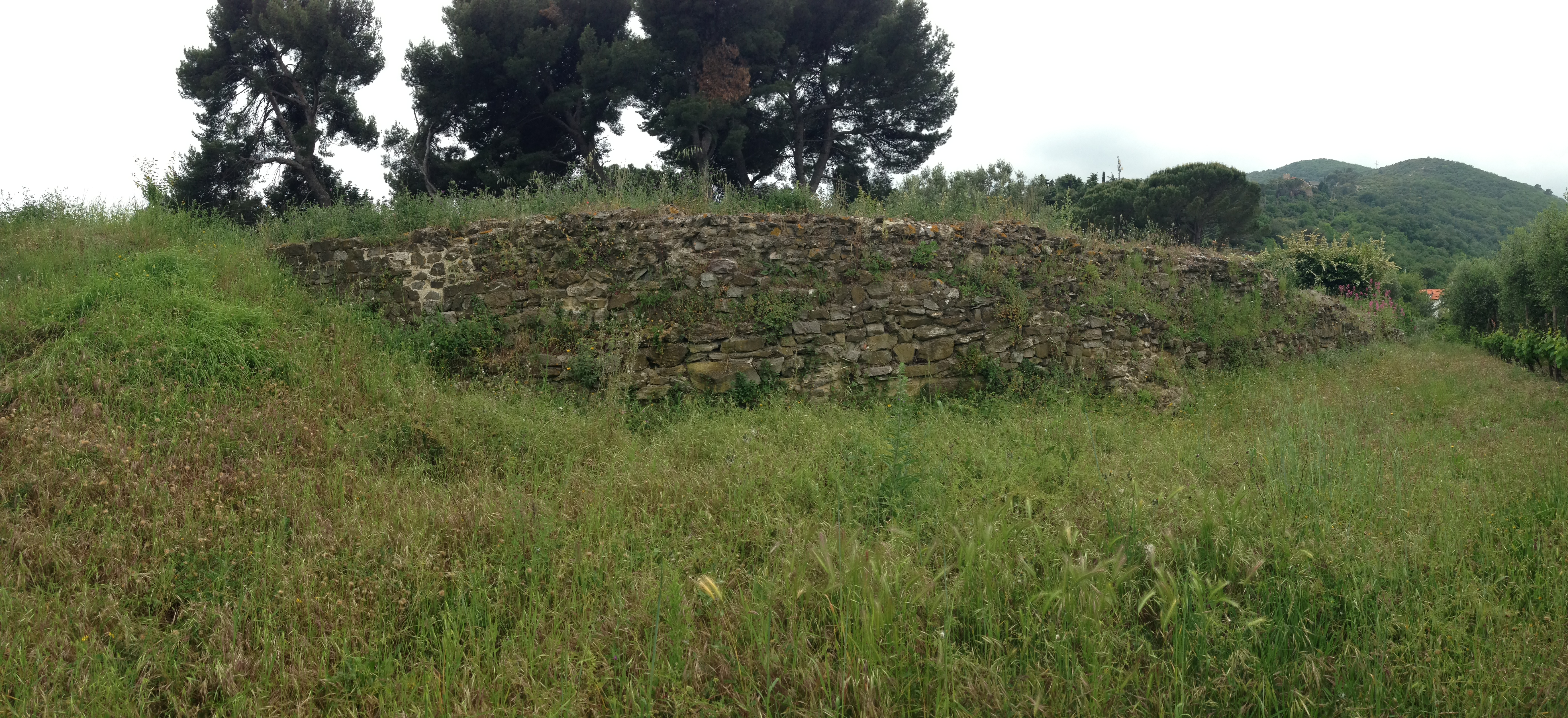 Muro dell'ex-anfiteatro romano di Albenga, diventato un muro di contenimento, la sua curvatura particolare fu quella che fece denunciare ad Alfredo D'Andrade la presenza dell'anfiteatro di Albenga, l'unico rinvenuto nel ponente ligure